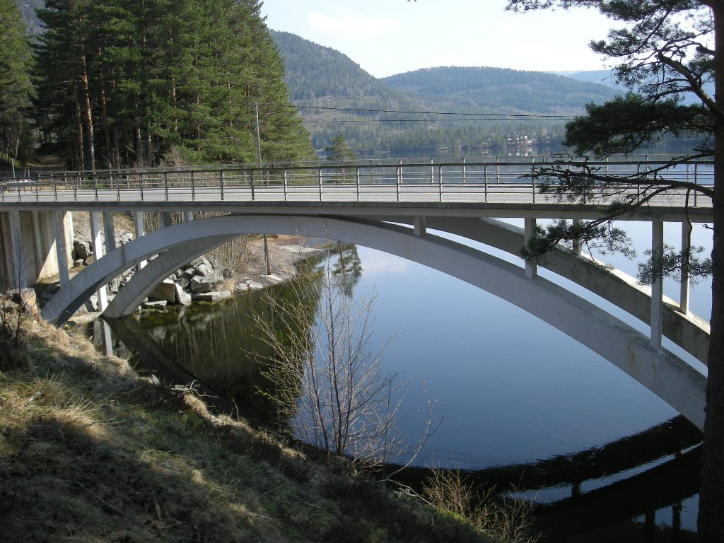 Veibroen med riksvei 9 mellom Byglandsfjorden og Åraksfjorden